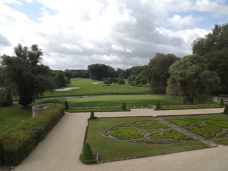 Vue de l'arrière du château d'Augerville sur le golf